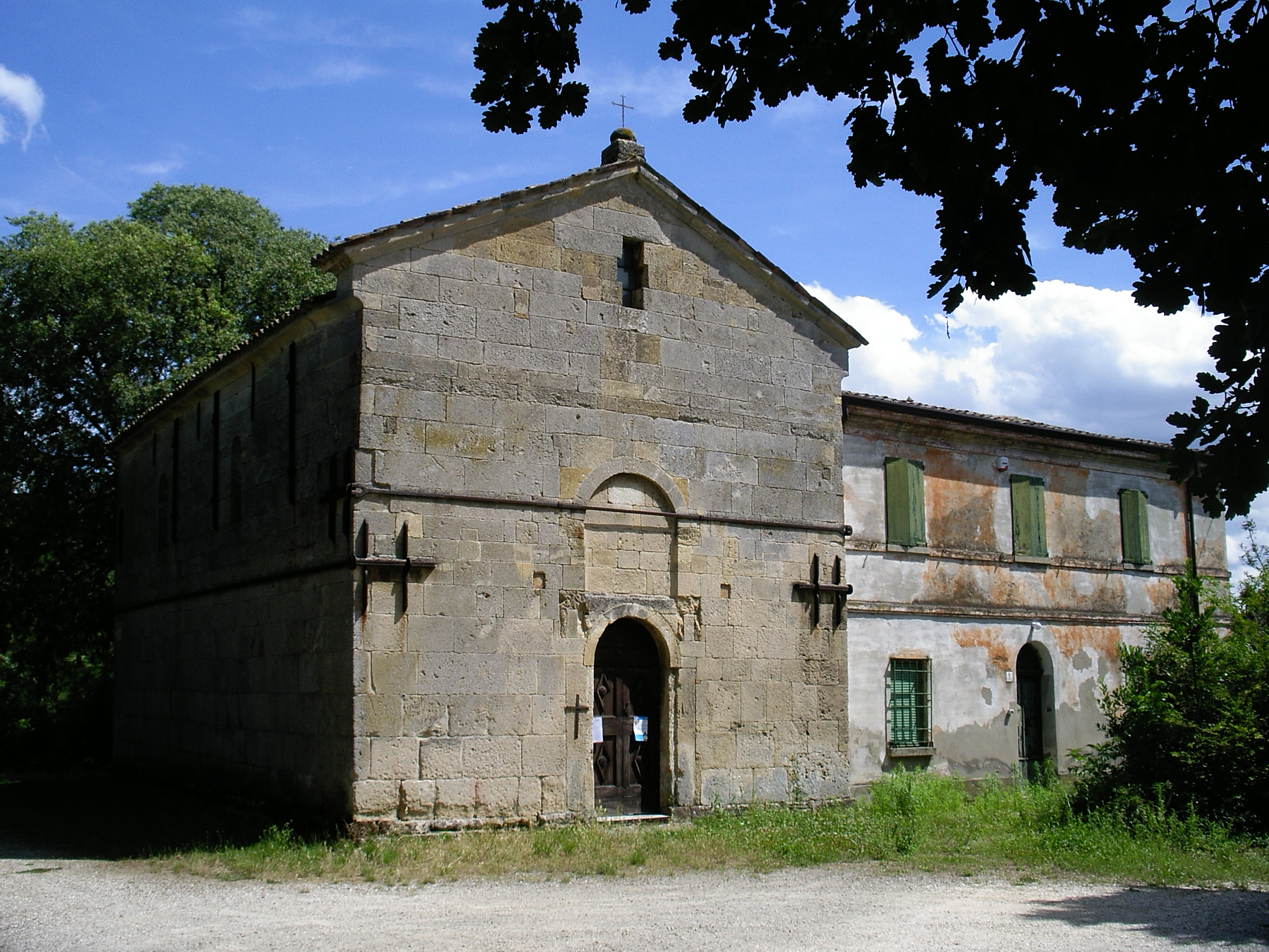 Predappio (Forlì-Cesena): chiesa di Sant'Agostino